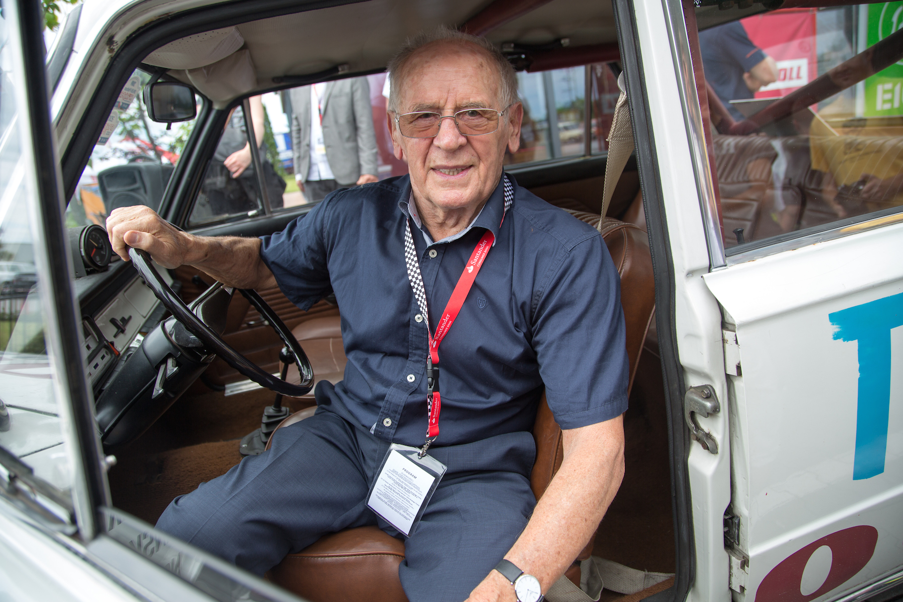 Sobiesław Zasada podczas uroczystości 40. lecia bicia rekordu prędkości Fiatem 125P w Kątach Wrocławskich